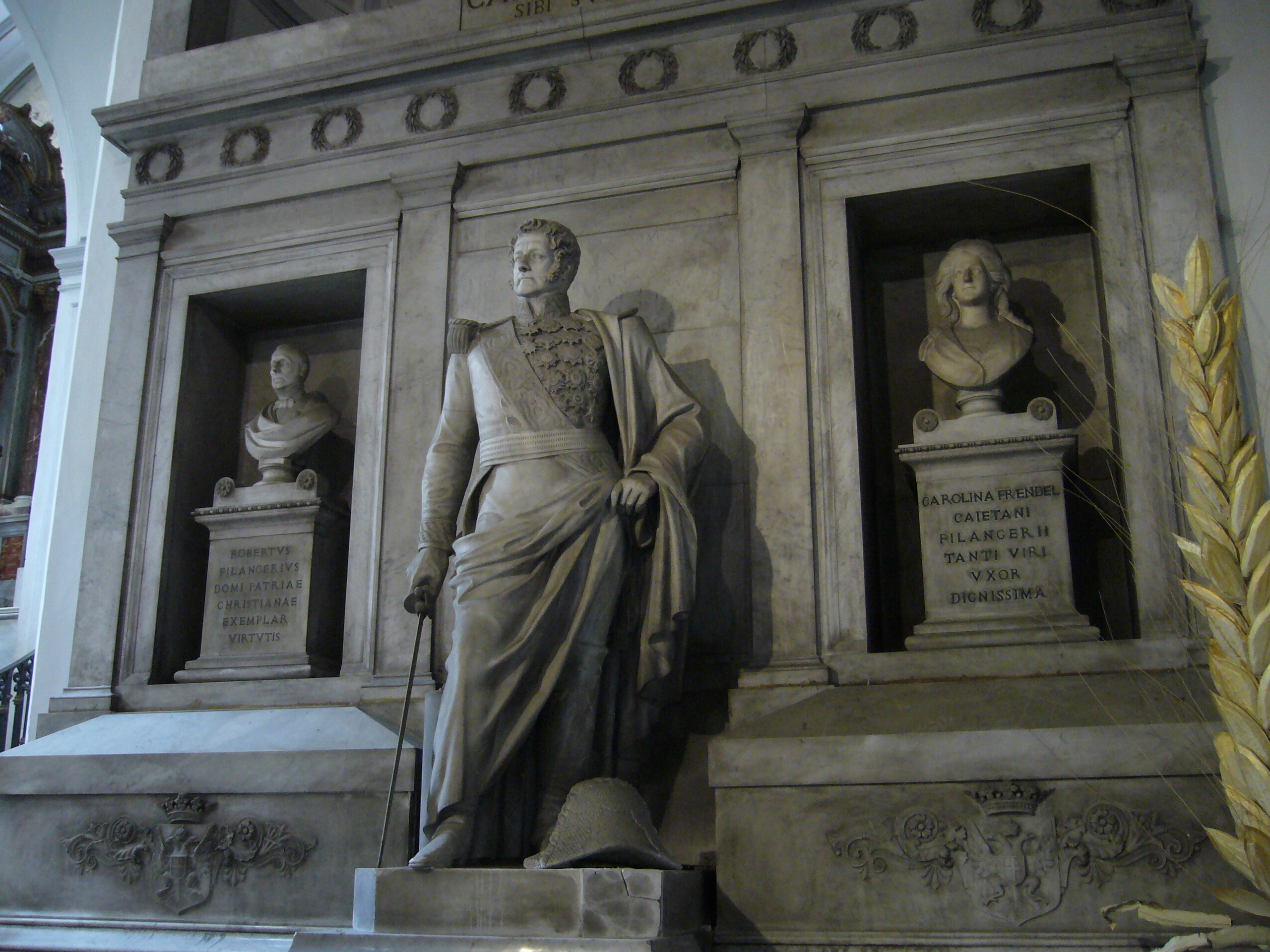 Monumento funebre a Carlo Filangieri (1784-1867), Chiesa di Santa Maria di Piedigrotta, Napoli. Opera di Nicola Renda (1815-1892) su disegno di Enrico Alvino (1810-1876).